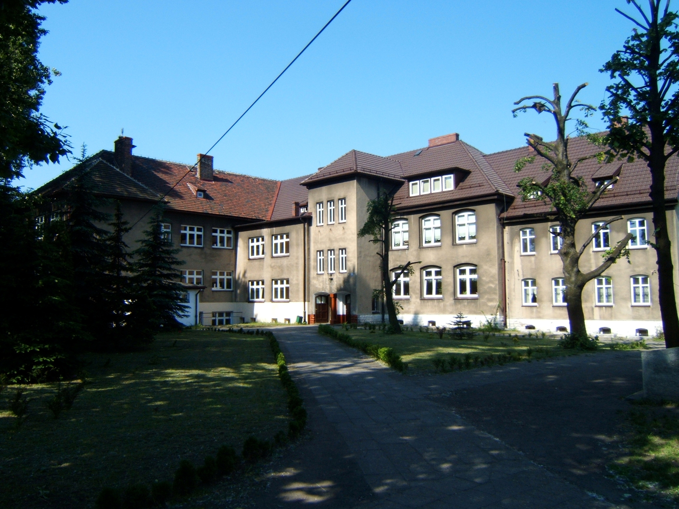 Zespół Szkół (szkoła podstawowa i gimnazjum) imienia Kai Mireckiej-Ploss, Nakło Śląskie, Polska